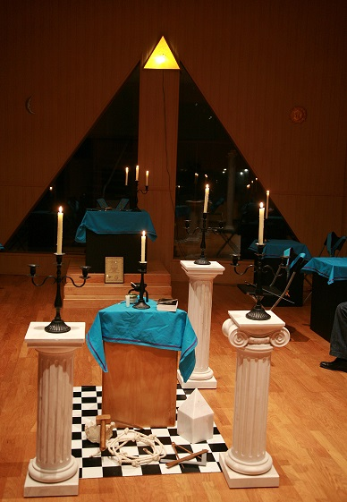 Imagem do Templo da G.L.S.F. em Lisboa, no ano de 2008.